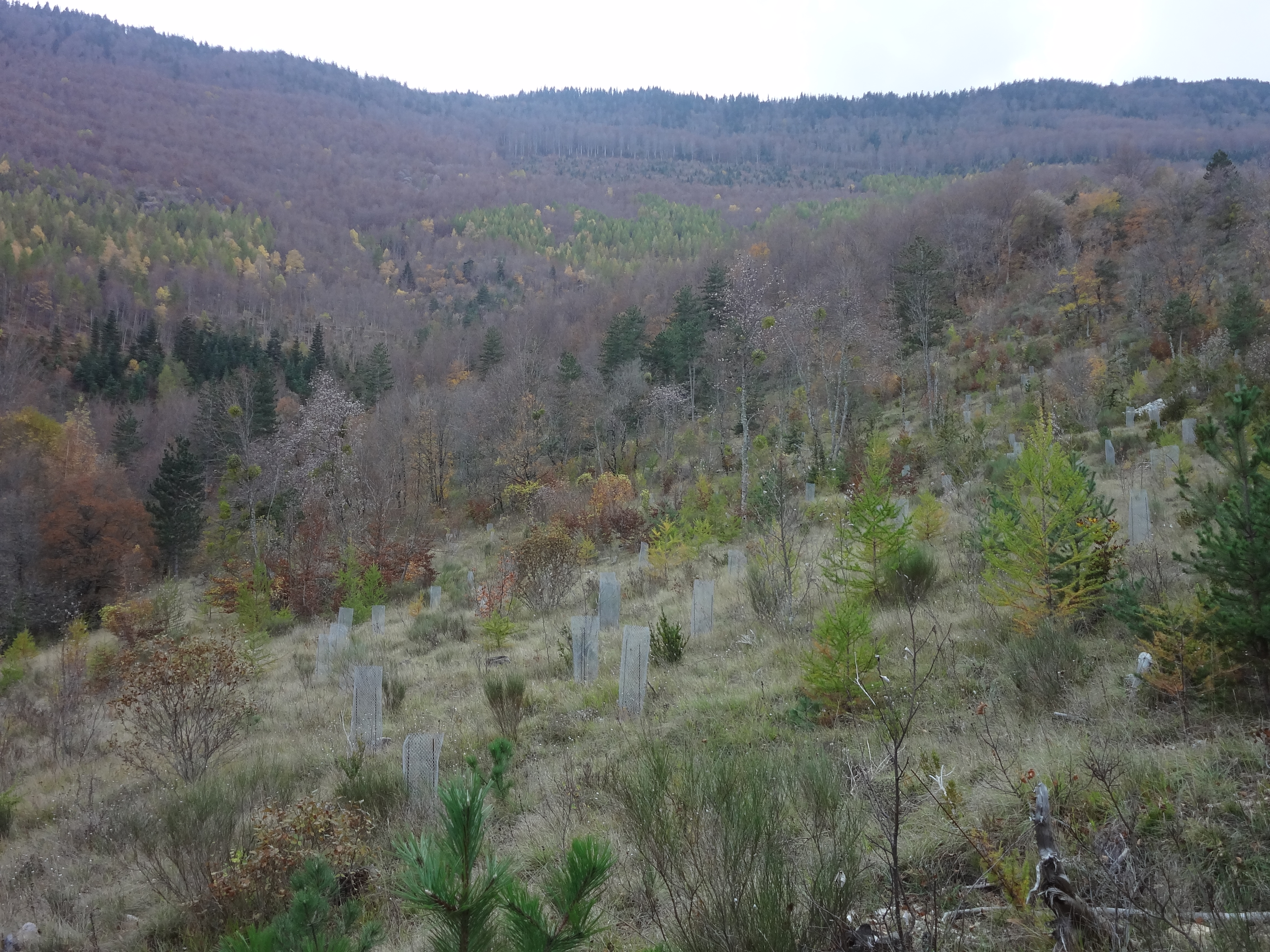 Reboisement sur le flanc nord de la montagne de Lure